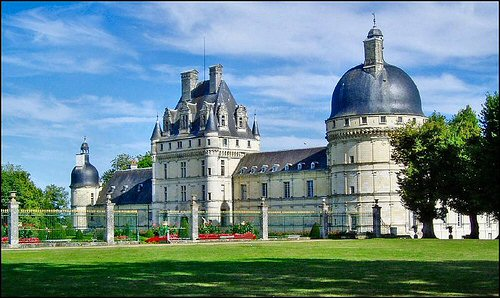 Château de Valençay